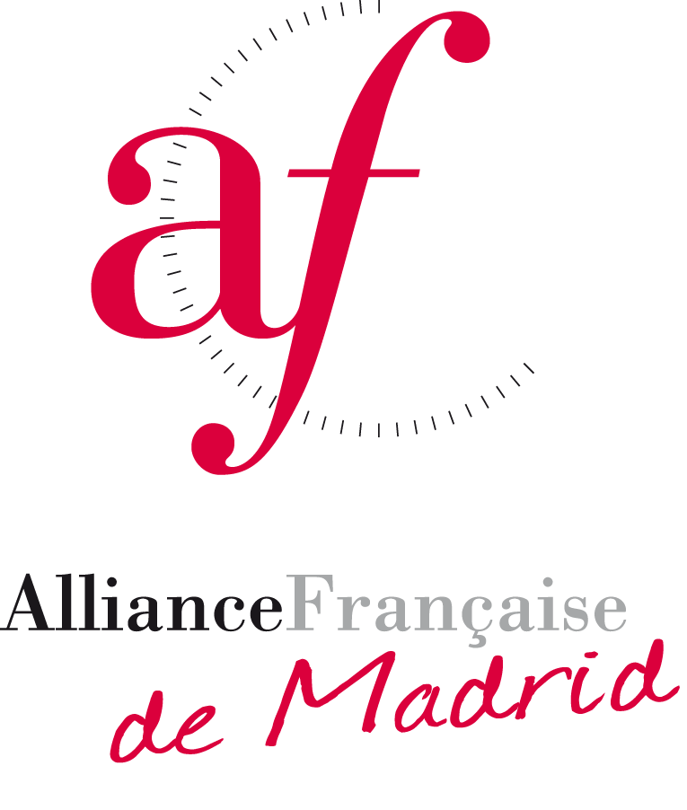 logotipo de la Alliance Française de Madrid